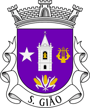 Brasão da Freguesia de São Gião, Concelho de Oliveira do Hospital, Distrito de Coimbra, Portugal